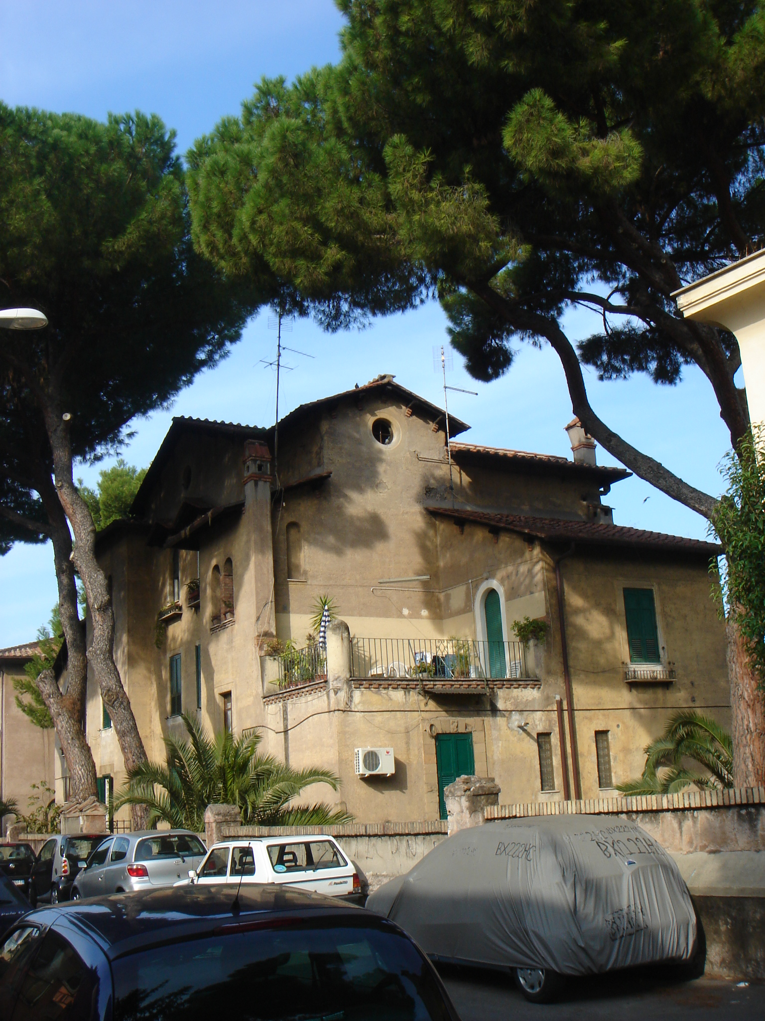 Roma, Garbatella: case